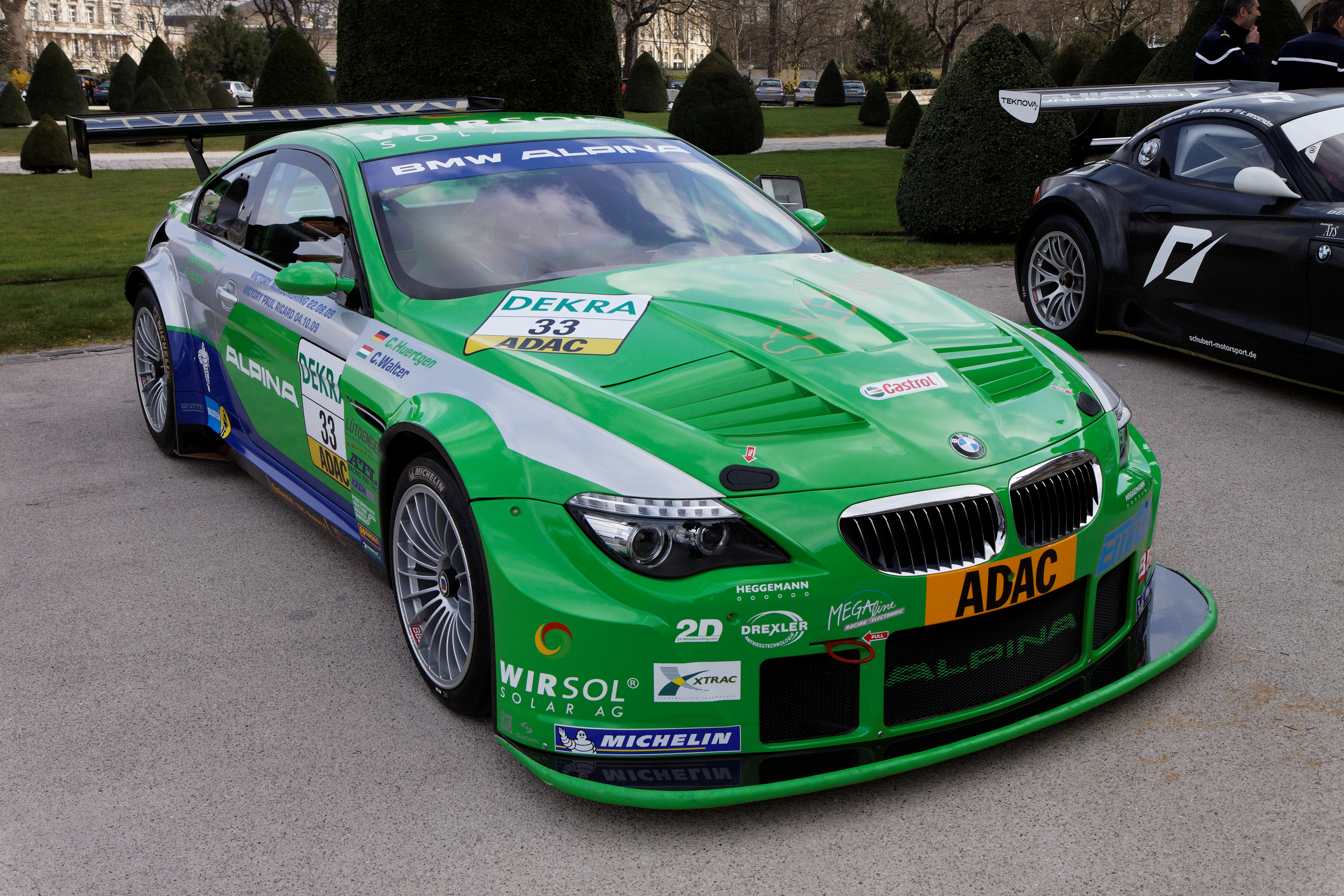 Photographie prise lors de la présentation du Blancpain Endurance series aux Invalides à Paris en mars 2011.